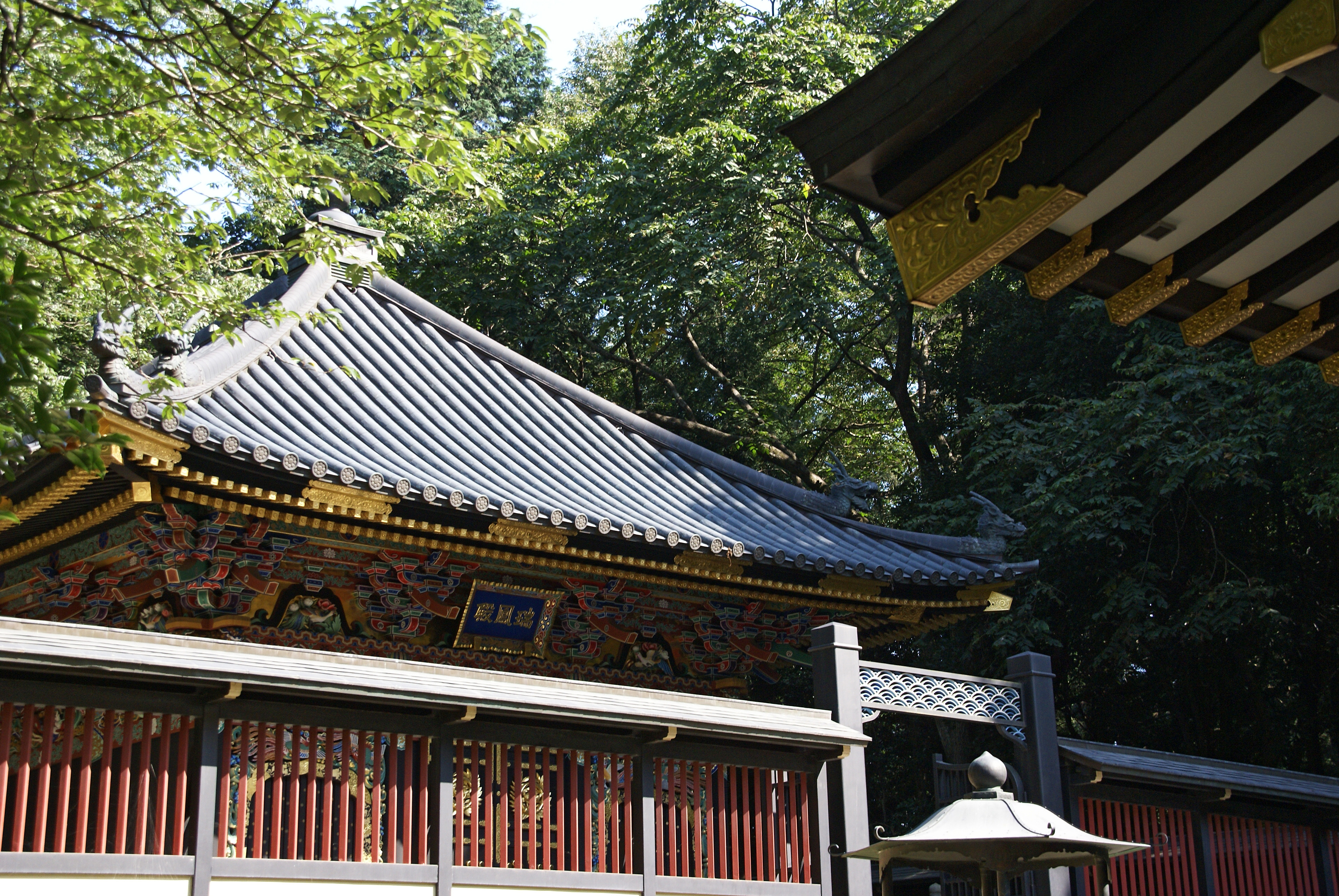 Zuiho-den in Sendai, Miyagi prefecture, Japan